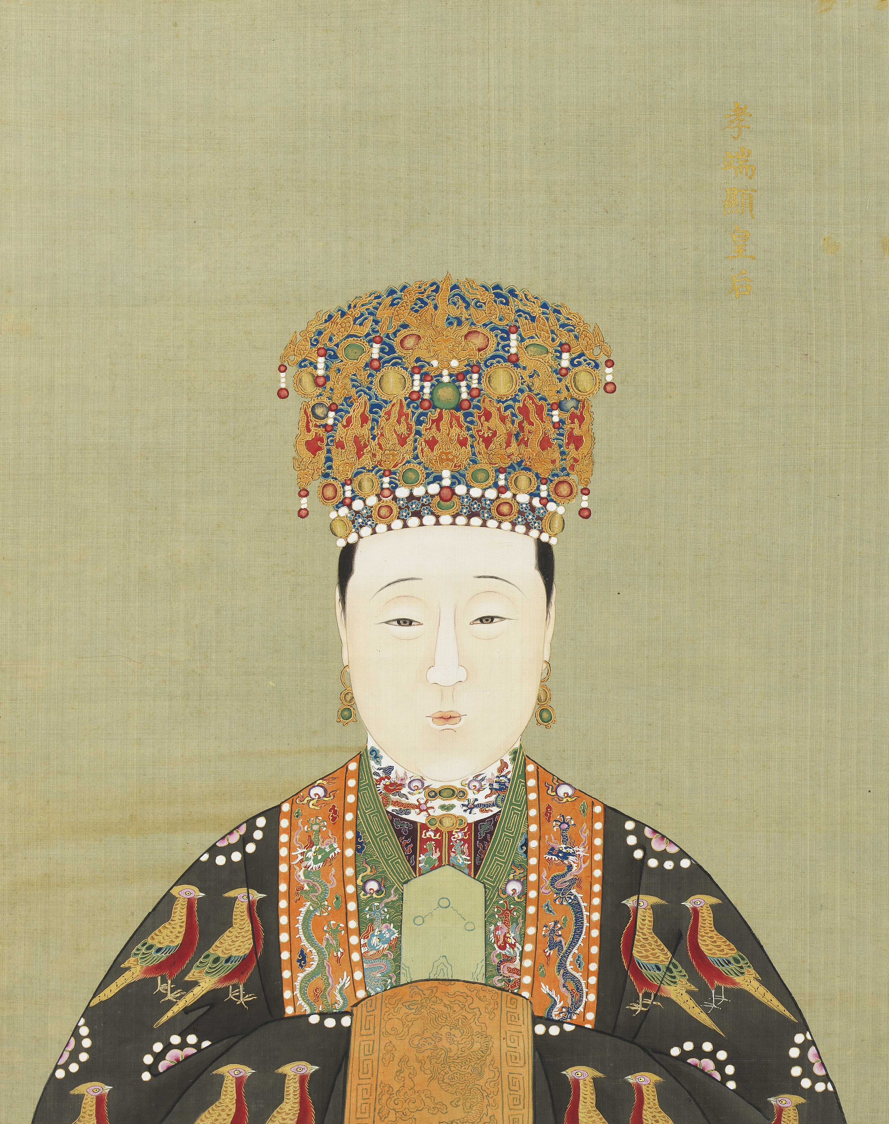 中文（中国大陆）: 作者已经去世超过200年，作品已经进入公有领域。